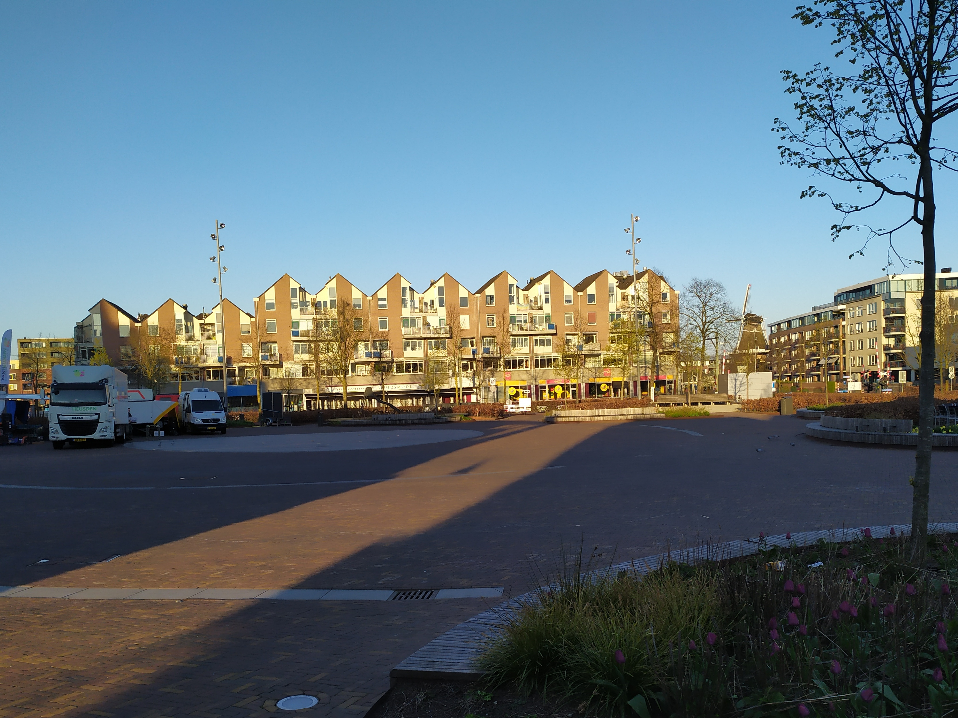 Markt Ede. Kleine maandagmarkt wegens coronacrisis.